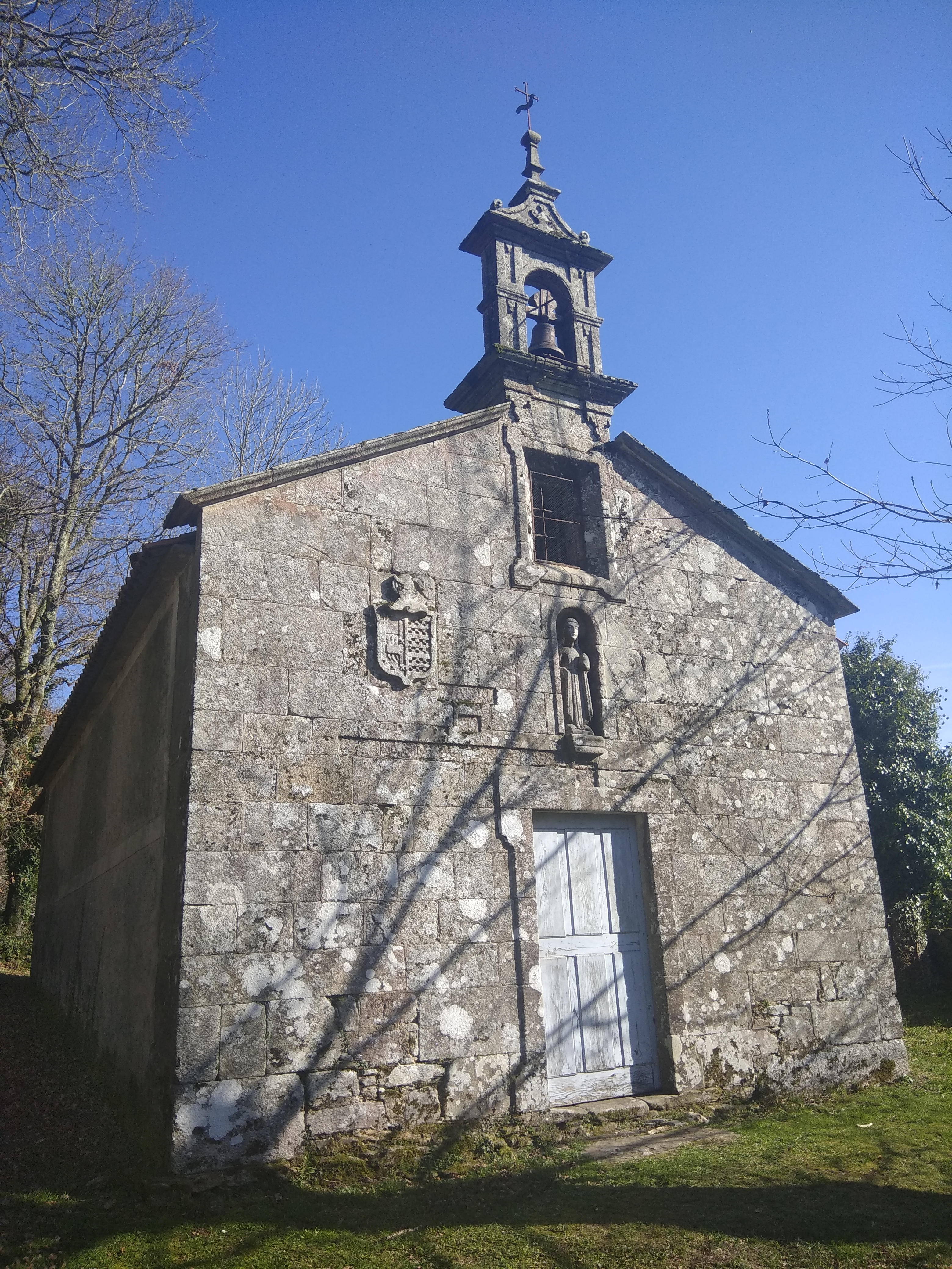 Capela da Armada (Cumbraos, Sobrado, Galiza).